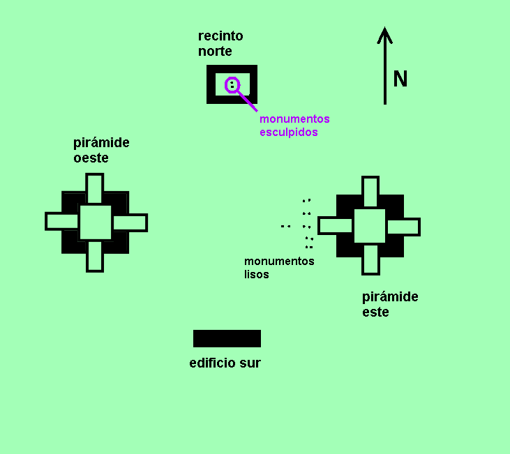 Plano de un complejo de pirámides gemelas, tal como se encuentra en Tikal.